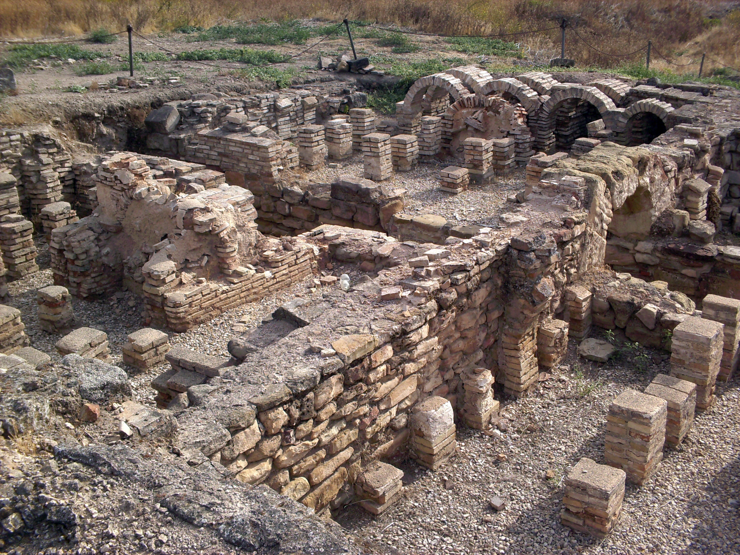 Castillo de Santa Eufemia, en Cástulo.